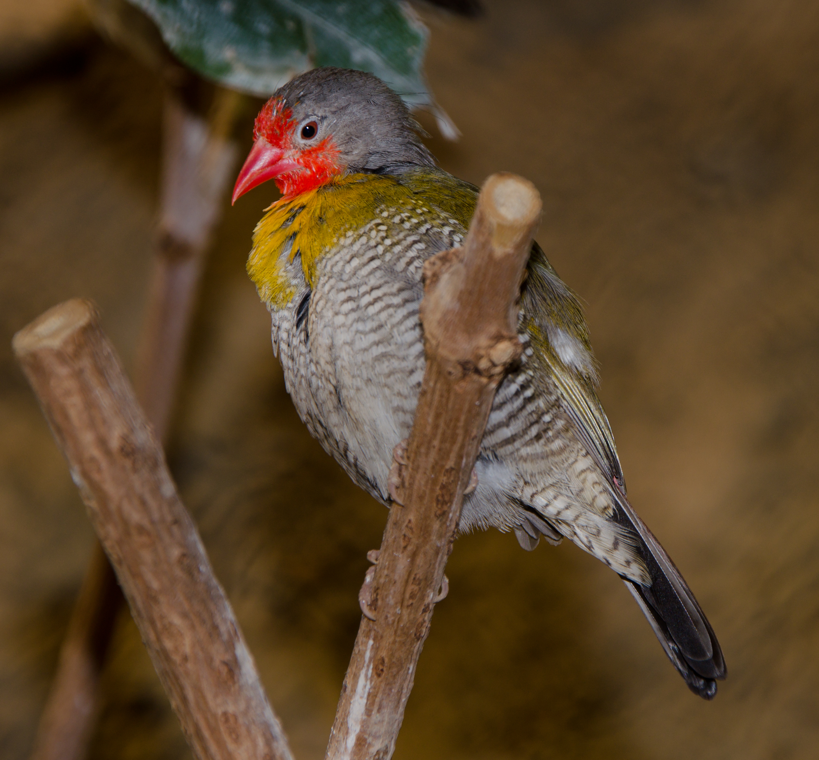 Pytilia melba, Buntastrild im Tierpark Hagenbeck